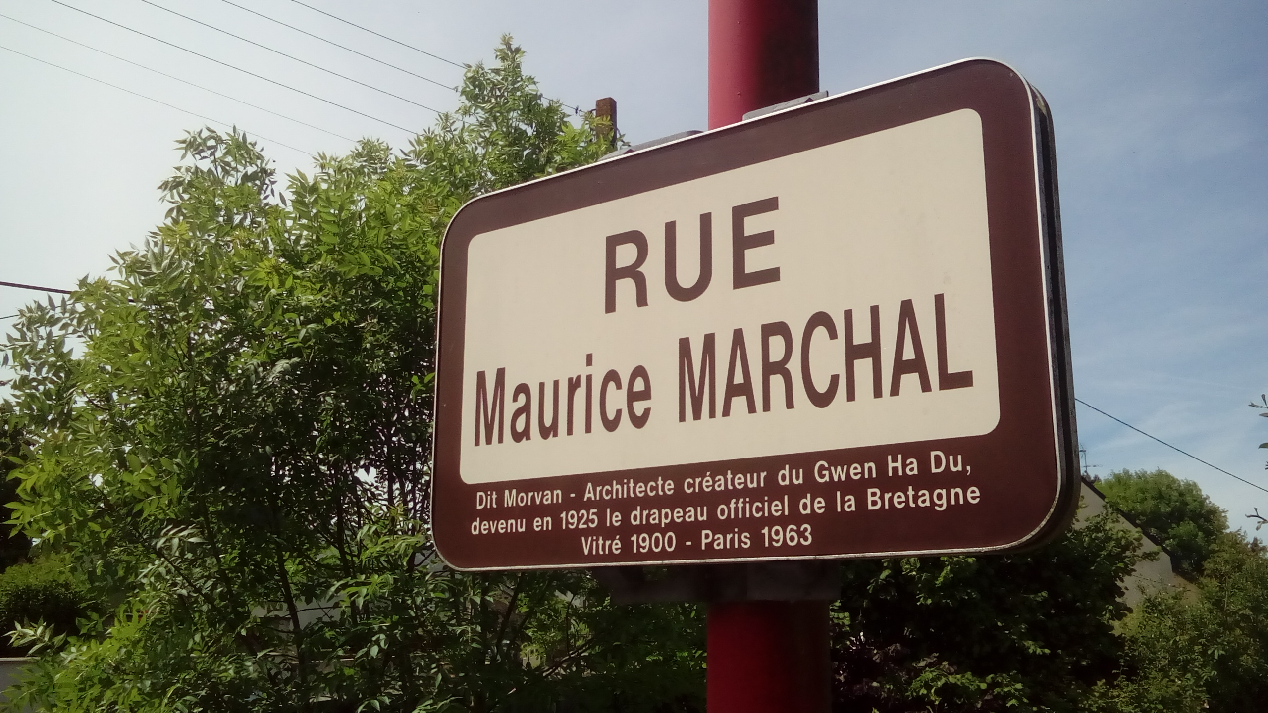 plaque de la rue Maurice Marchal, Vitré, France.